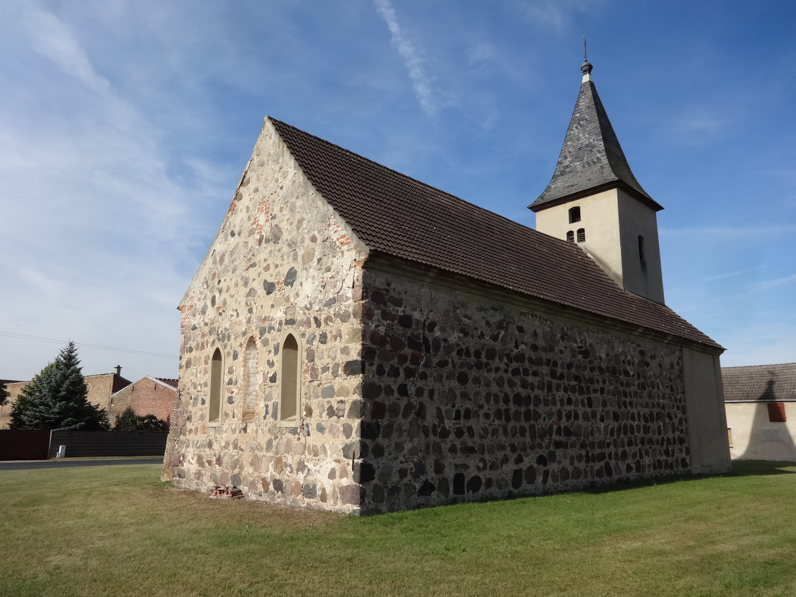 Die Dorfkirche in Kemnitz ist eine Saalkirche, die vermutlich in der ersten Hälfte des 14. Jahrhunderts aus Feldsteinen errichtet wurde. 1739 wurde der Kirchturm angebaut. Im Innern befindet sich ein hölzerner Kanzelaltar aus dem 18. Jahrhundert sowie eine Sakramentsnische.